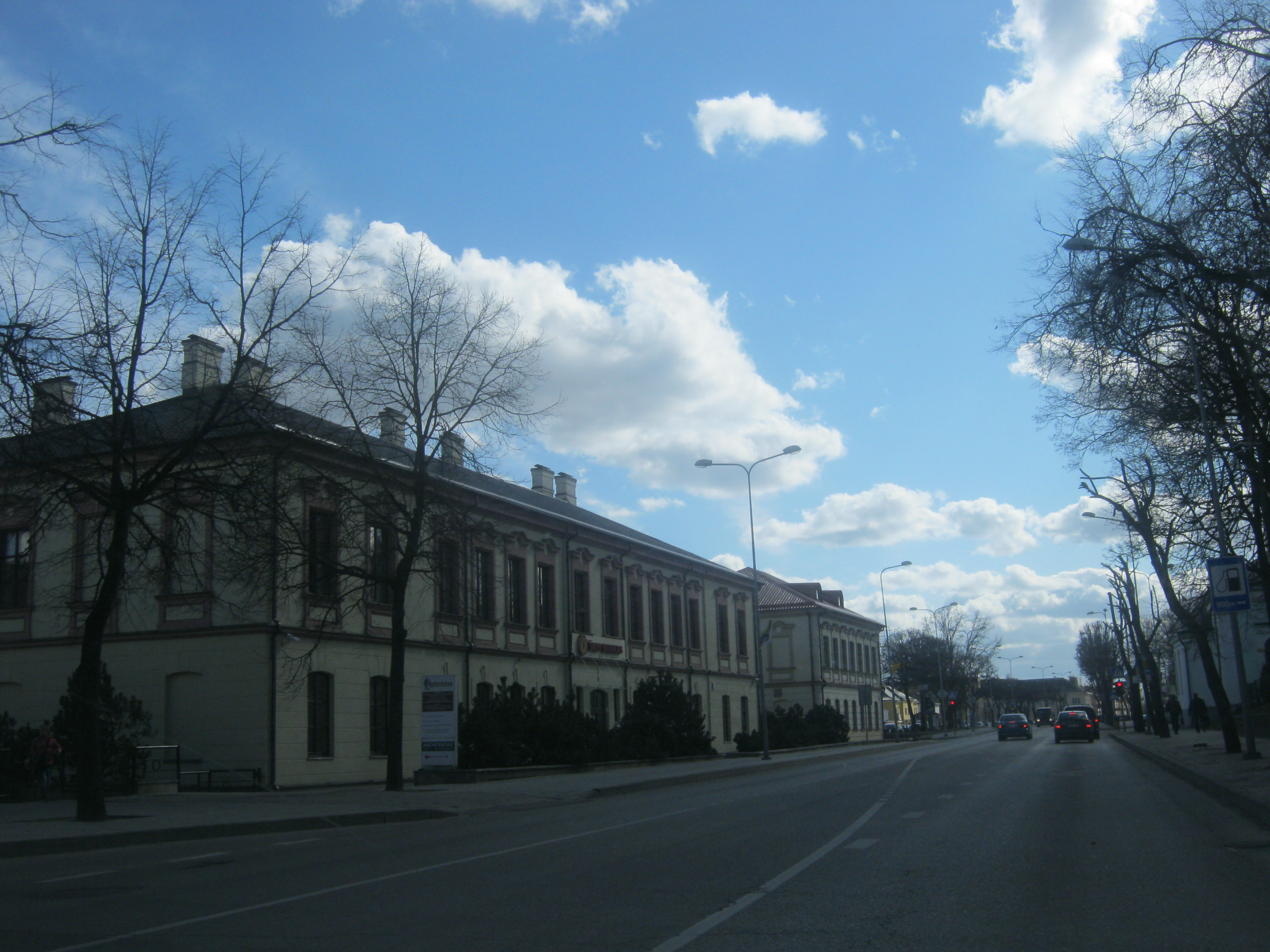 Kėdainiai